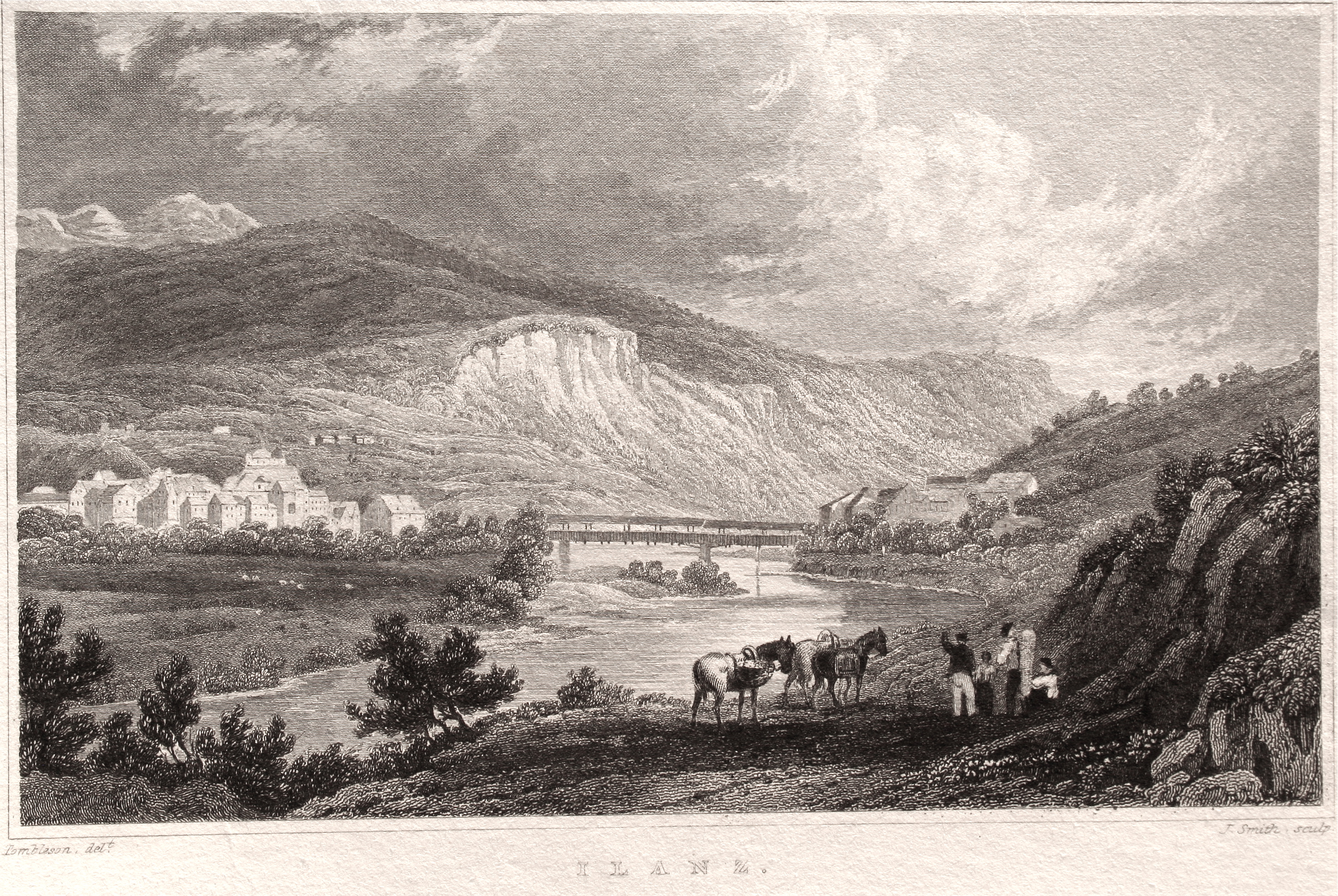 Ilanz um 1830, Blick nach Westen